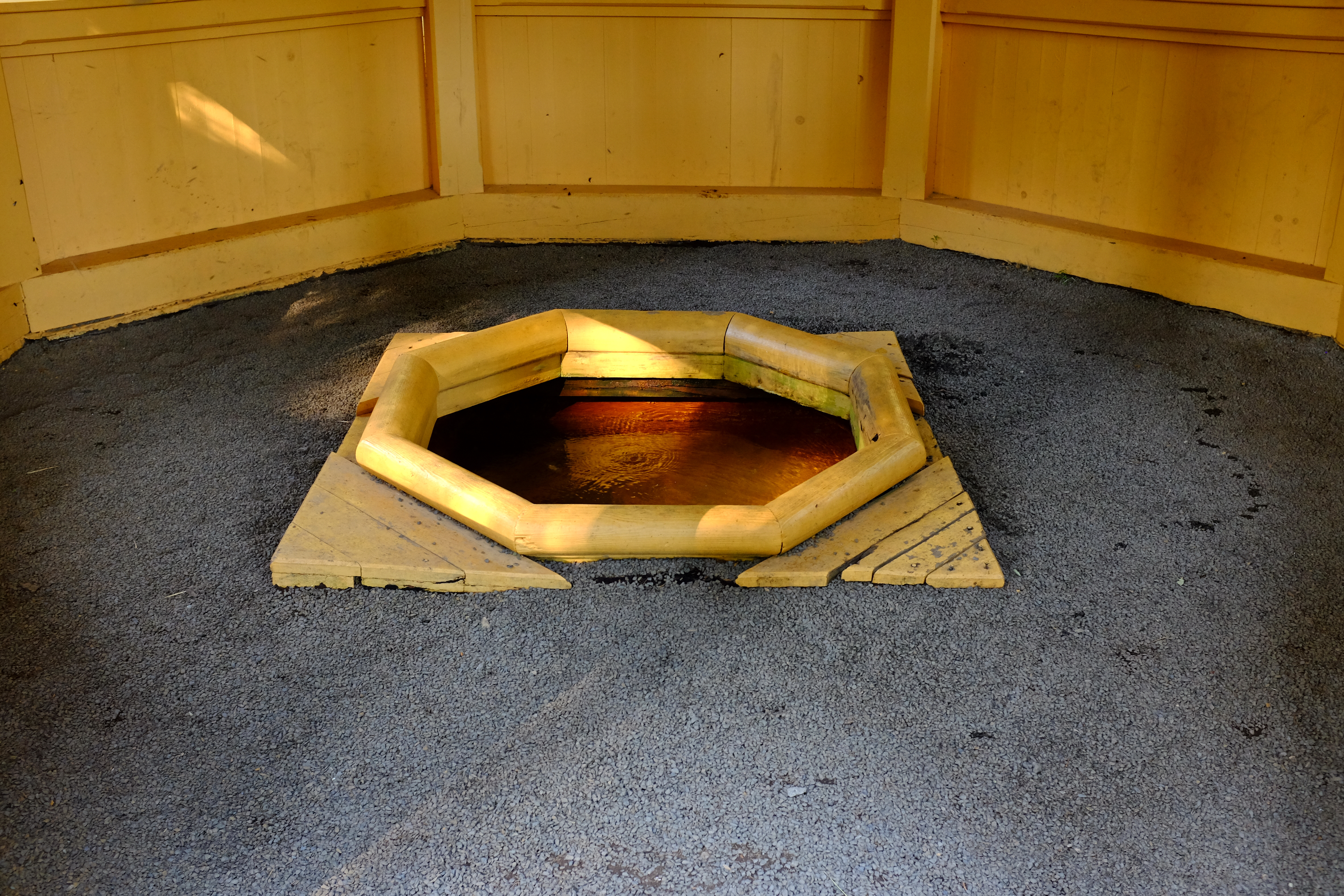 Farská kyselka, Slavkovský les, okres Cheb